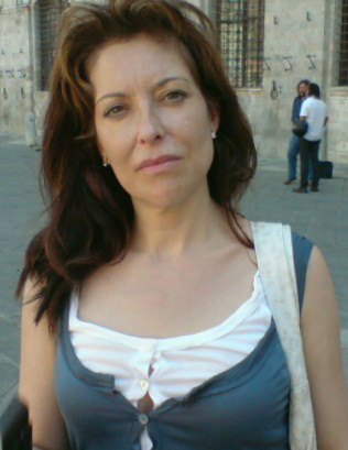 La escritora y periodista leonesa Belén Alonso de Santiago.